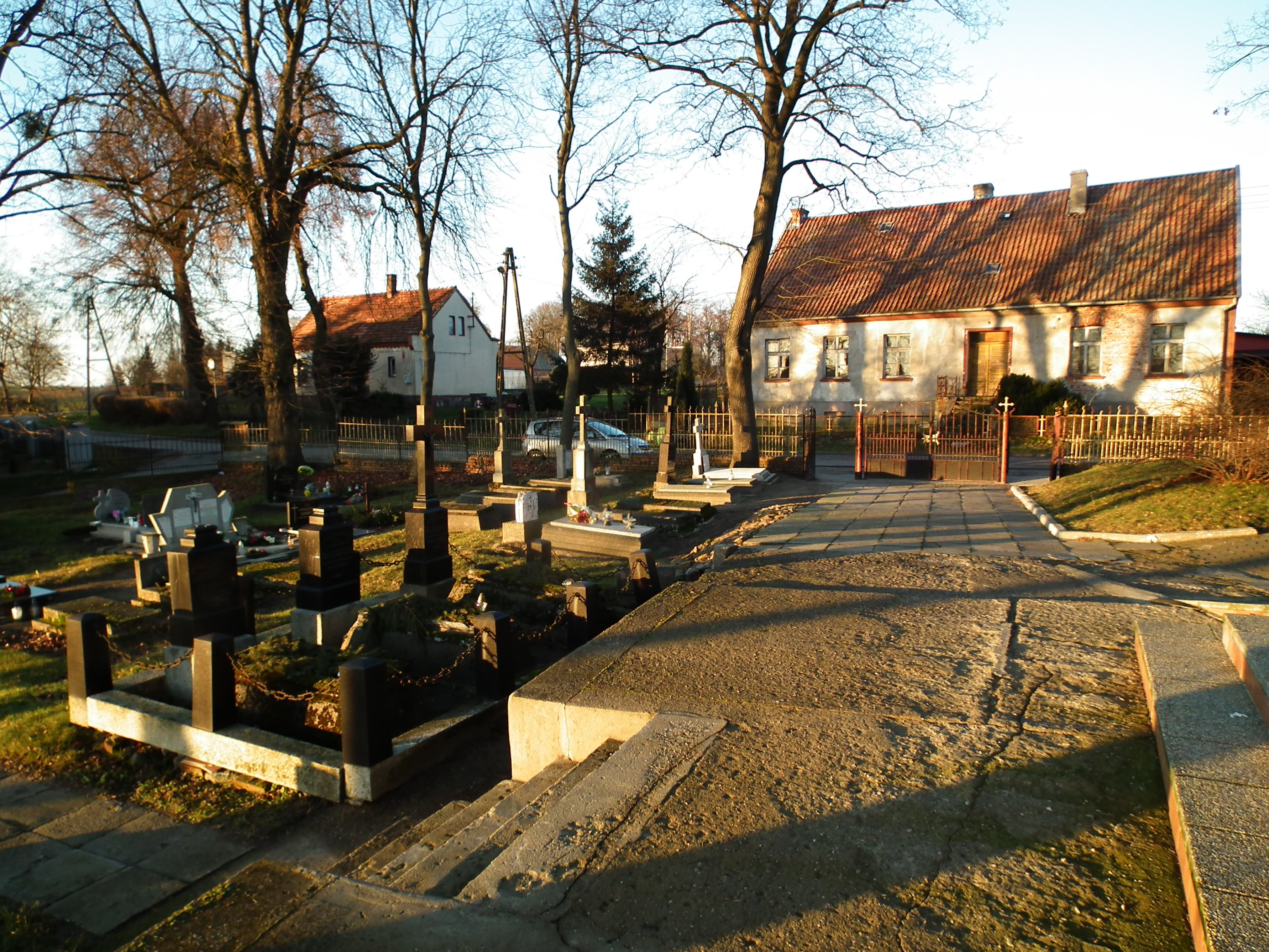 Wieś Kalwa koło Sztumu.